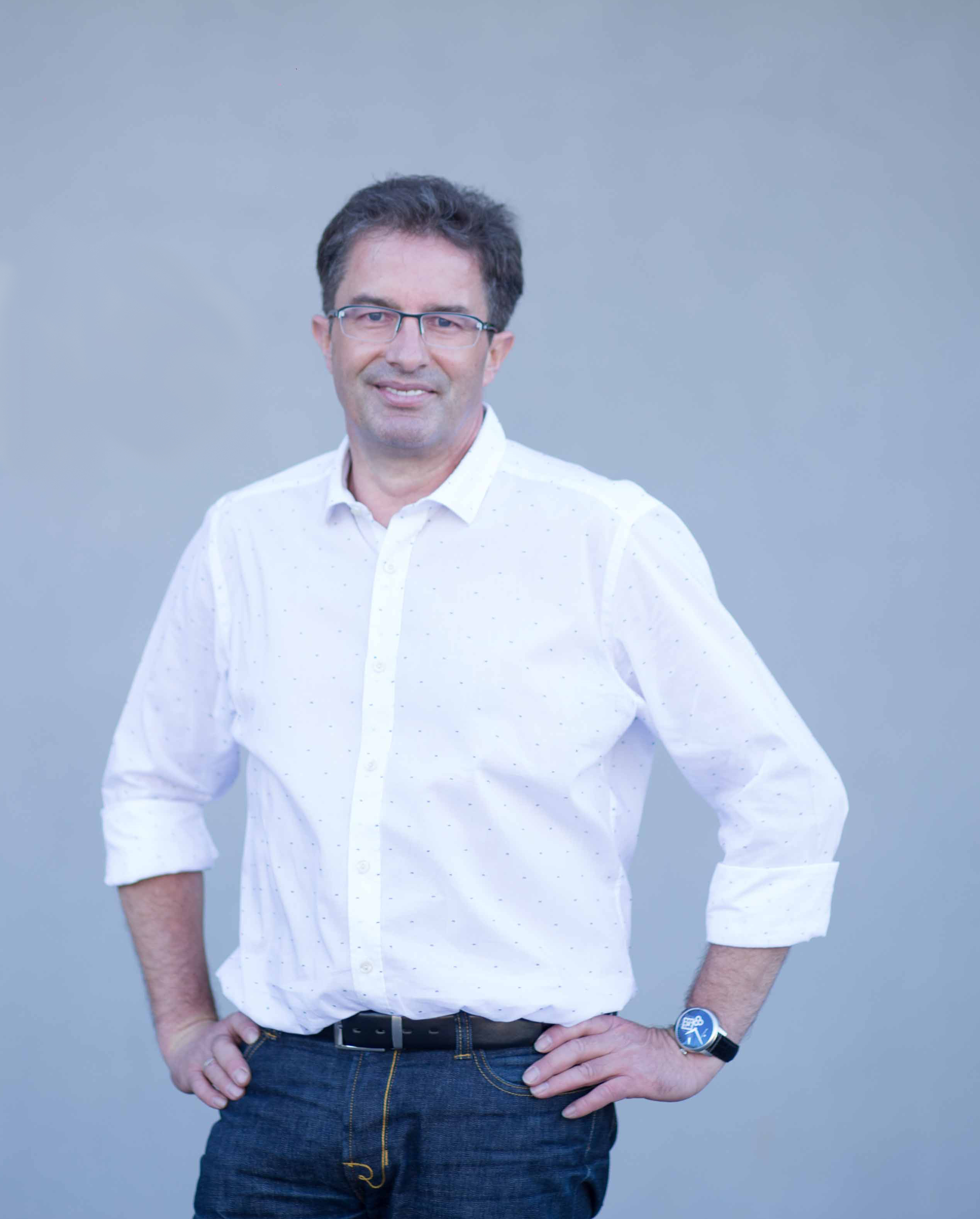 Prof. Dr.-Ing. habil. Jan Mehner